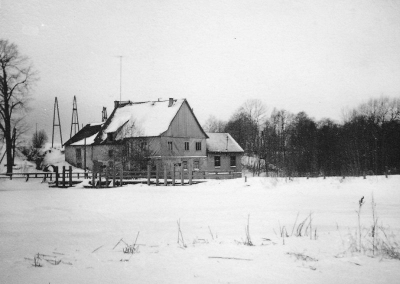 Varangu hüdroleketrijaam